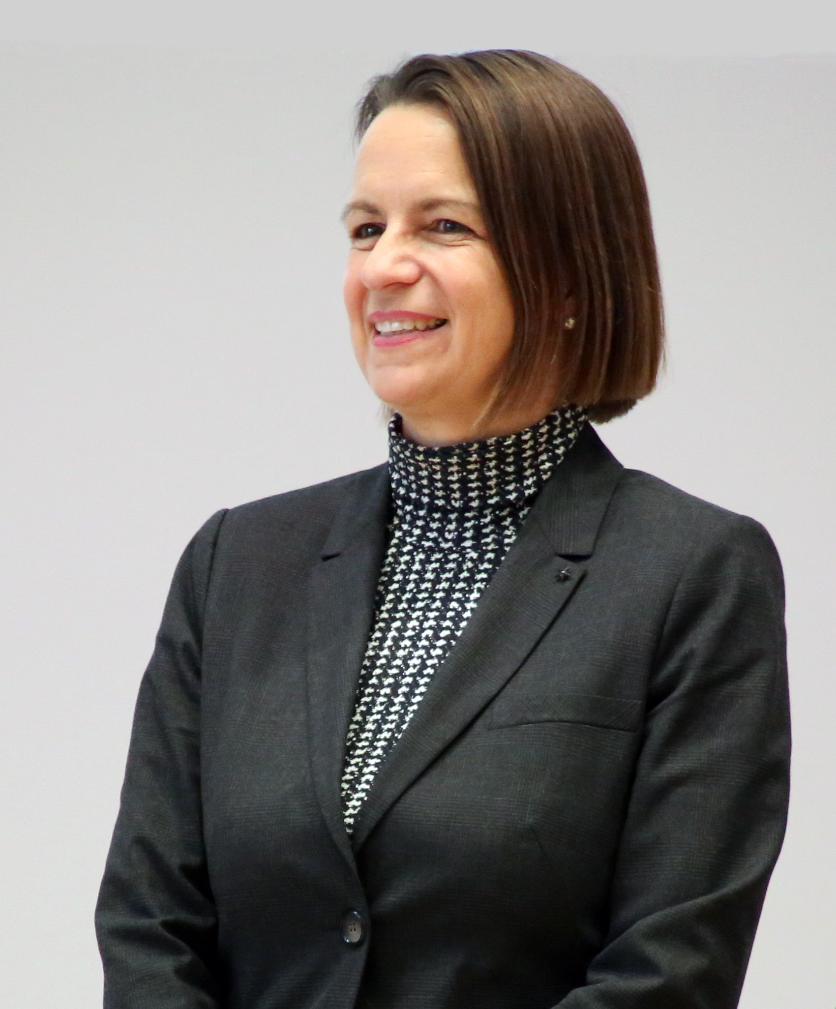 Staatssekretärin Babette Winter (Thüringer Ministerium für Landwirtschaft, Forsten, Umwelt und Naturschutz) beim 21. Thüringer Bibliothekstag am 21. Oktober 2015 in der Stadtbibliothek Nordhausen